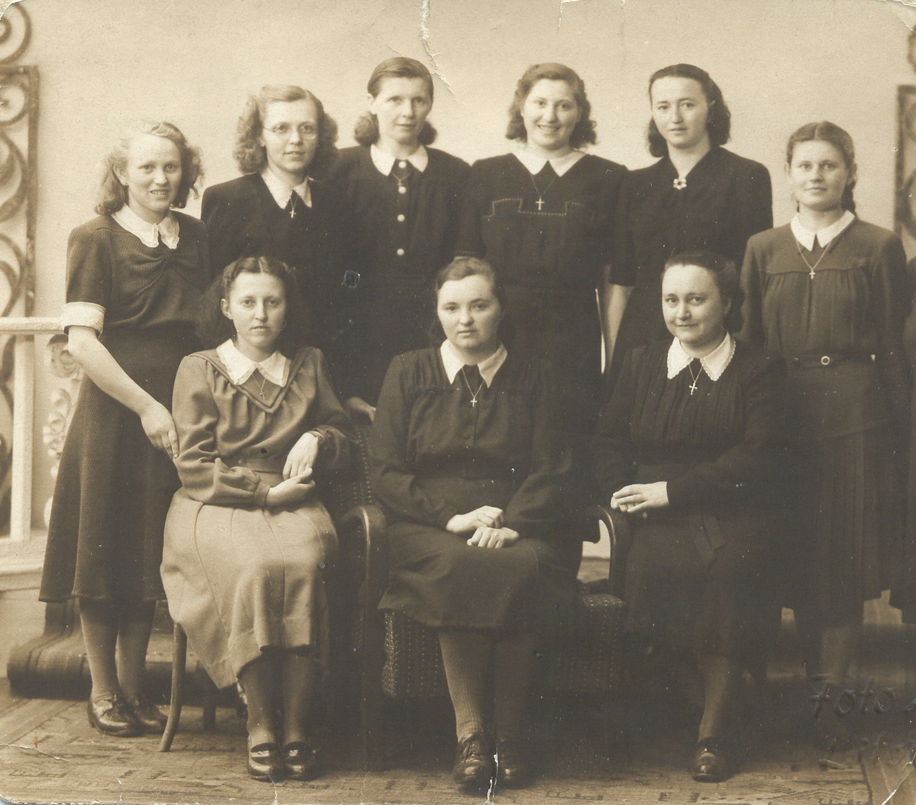 Sekulární institut Dílo blahoslavené Zdislavy - sestry Zdislávky, Litoměřice, kolem roku 1950